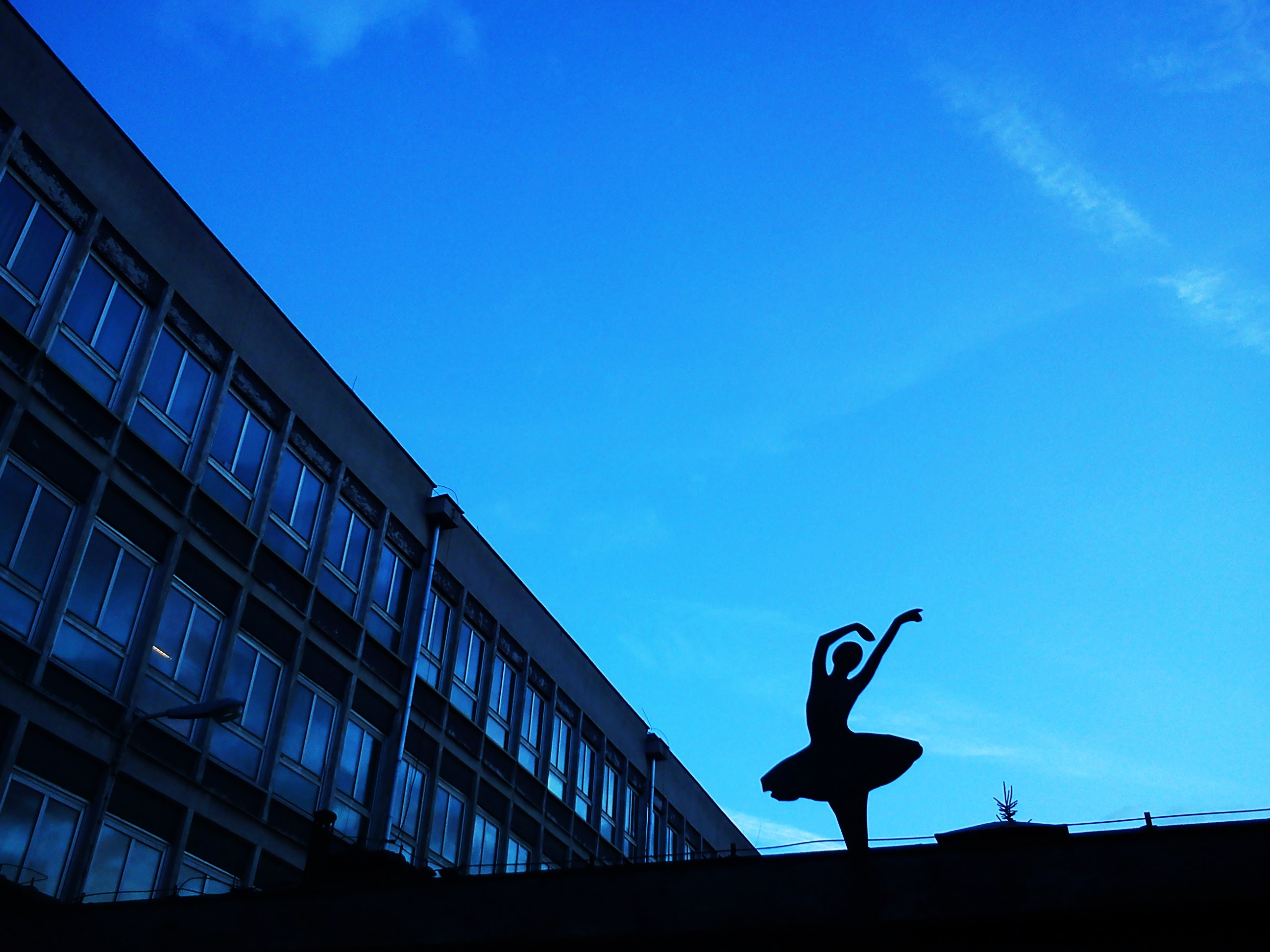 Gmach NOT - Poznań (ul. Wieniawskiego).